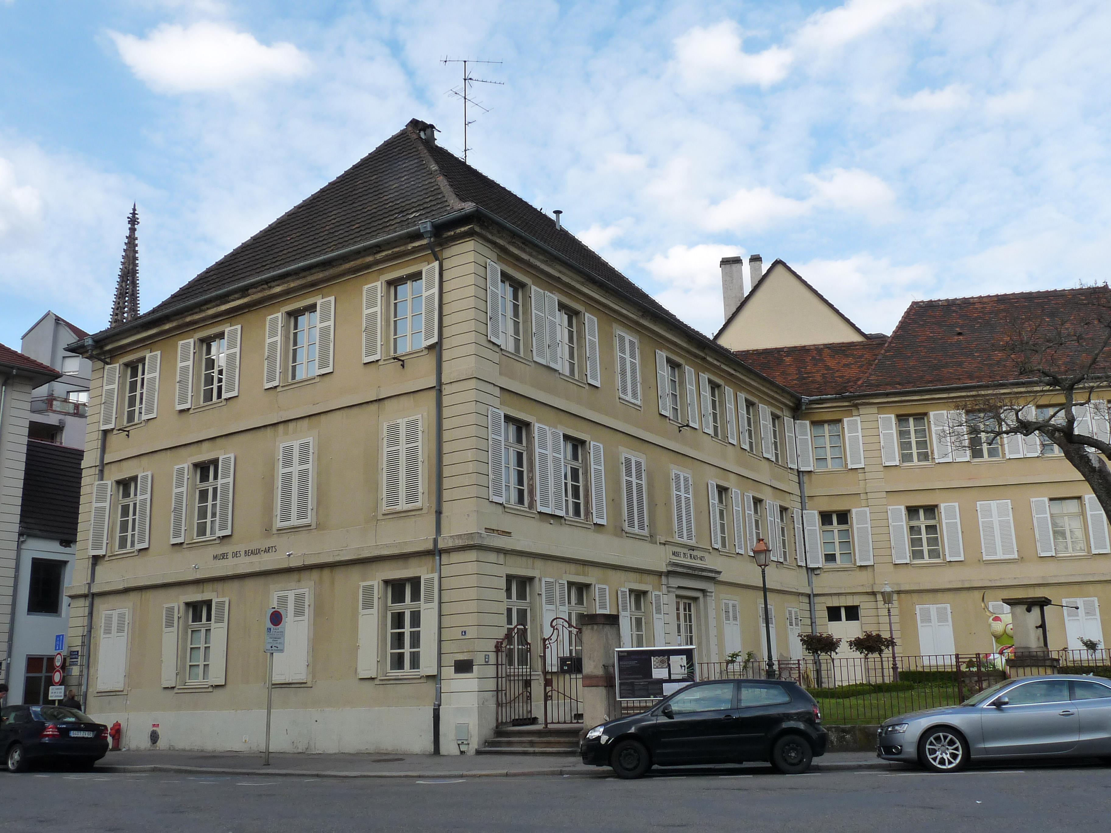 Musée des beaux-arts de Mulhouse, dans la Villa Steinbach